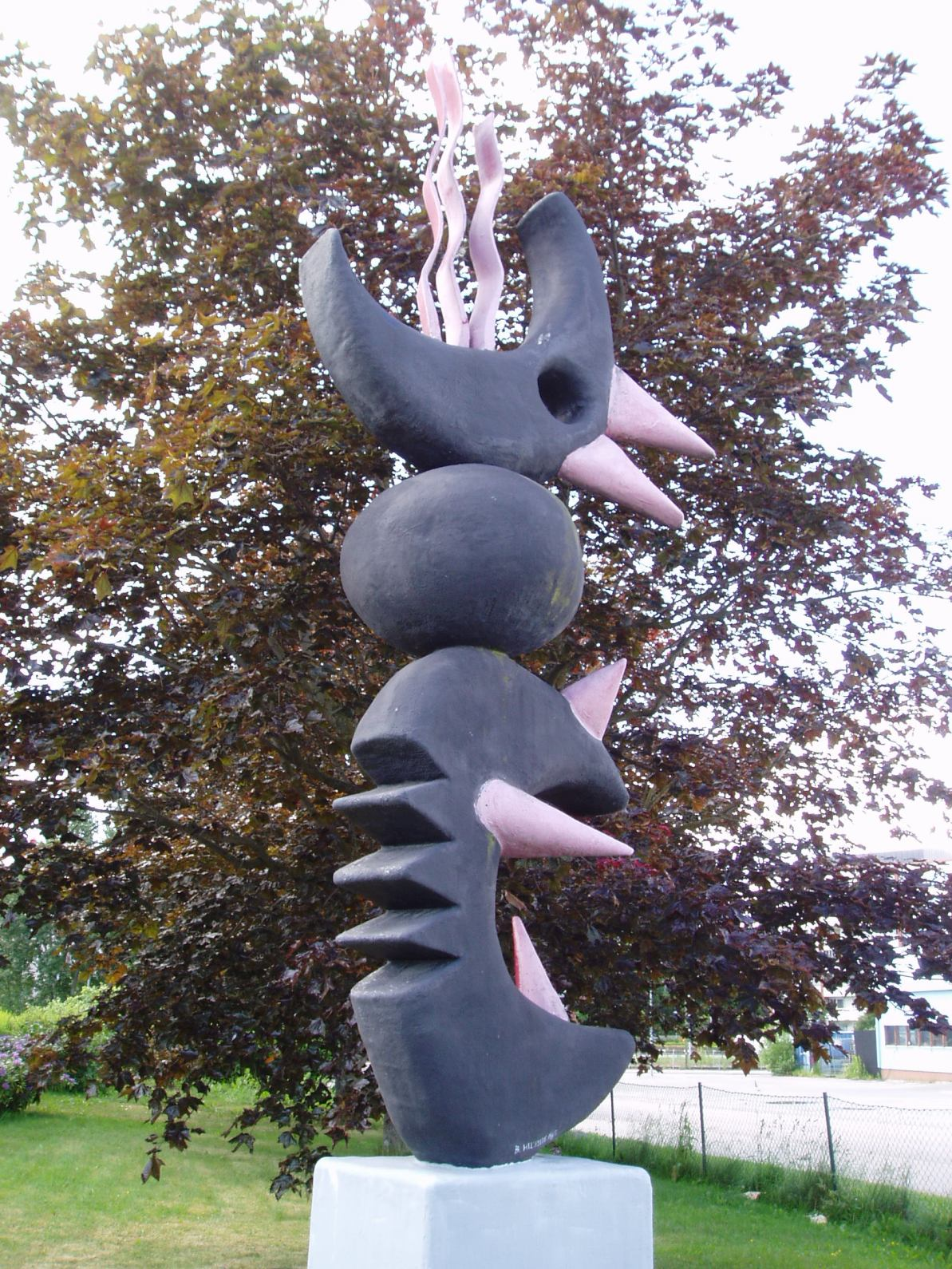 Åkersberga - staty vid brandstationen